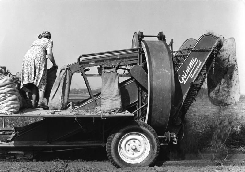 Landwirtschaftliche Aufnahmen in Lobberich bei Viersen am 20.9.1957 – Moderne Kartoffel-Erntemaschine mit Reinigen und Sacken der Ernte Information added by Wikimedia users.